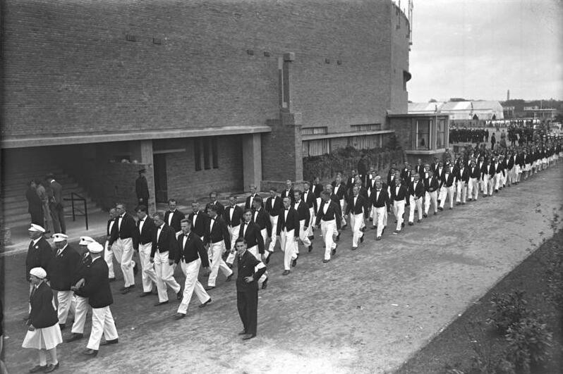 Die Eröffnung der olympischen Spiele in Amsterdam! Erste Aufnahmen vom Aufmarsch der Nationen im olympischen Stadion, unseres nach Amsterdam entsandten Sonder-Bild-Berichterstatters! Einmarsch der deutschen Teilnehmer in das olympische Stadion.